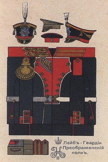 Форма обмундирования парадная лейб-гвардии Преображенского полка. 1910 год.